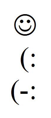 he:סמיילי בhe:מחשב